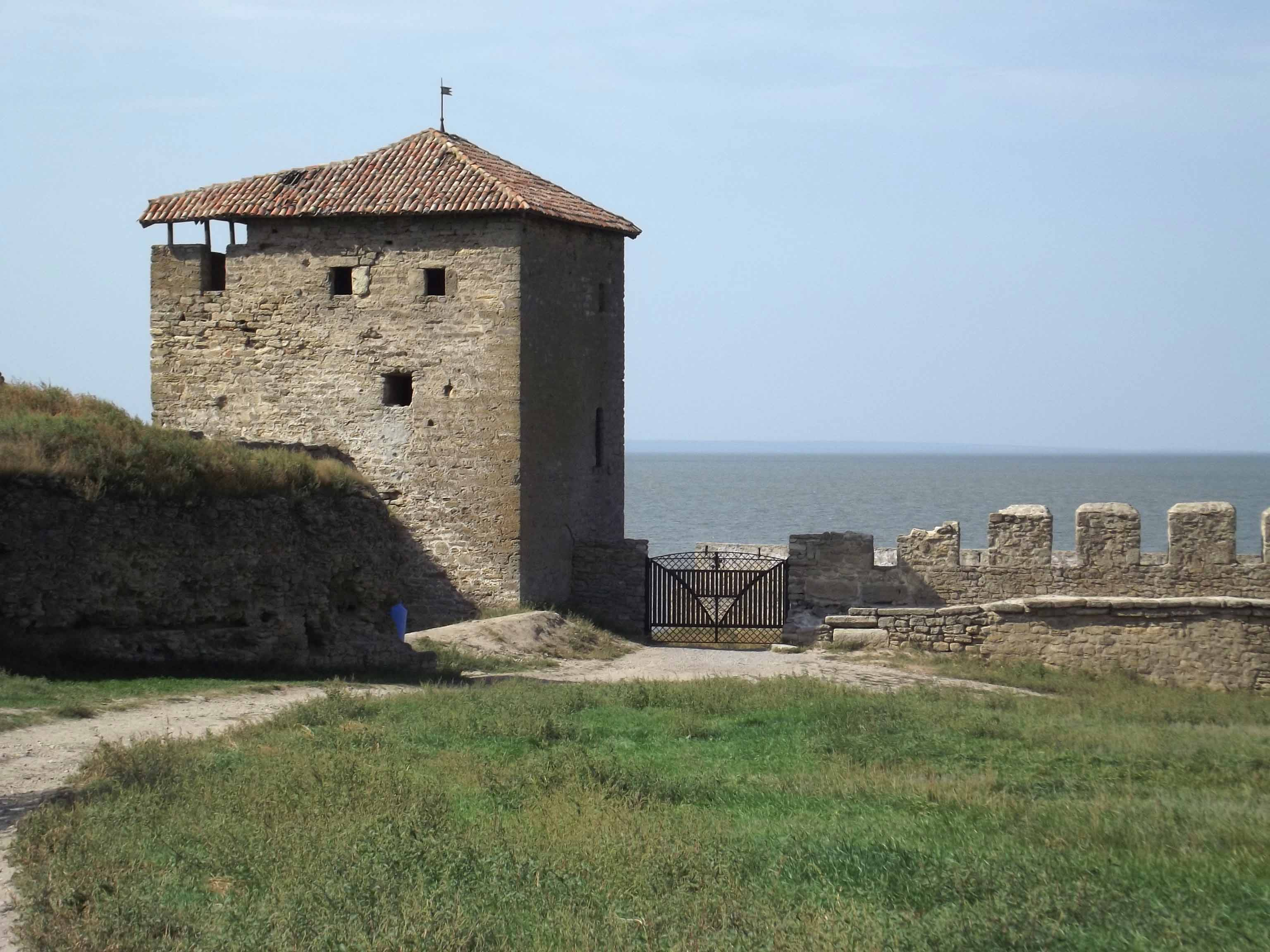 Крепость. Башня Пушкина